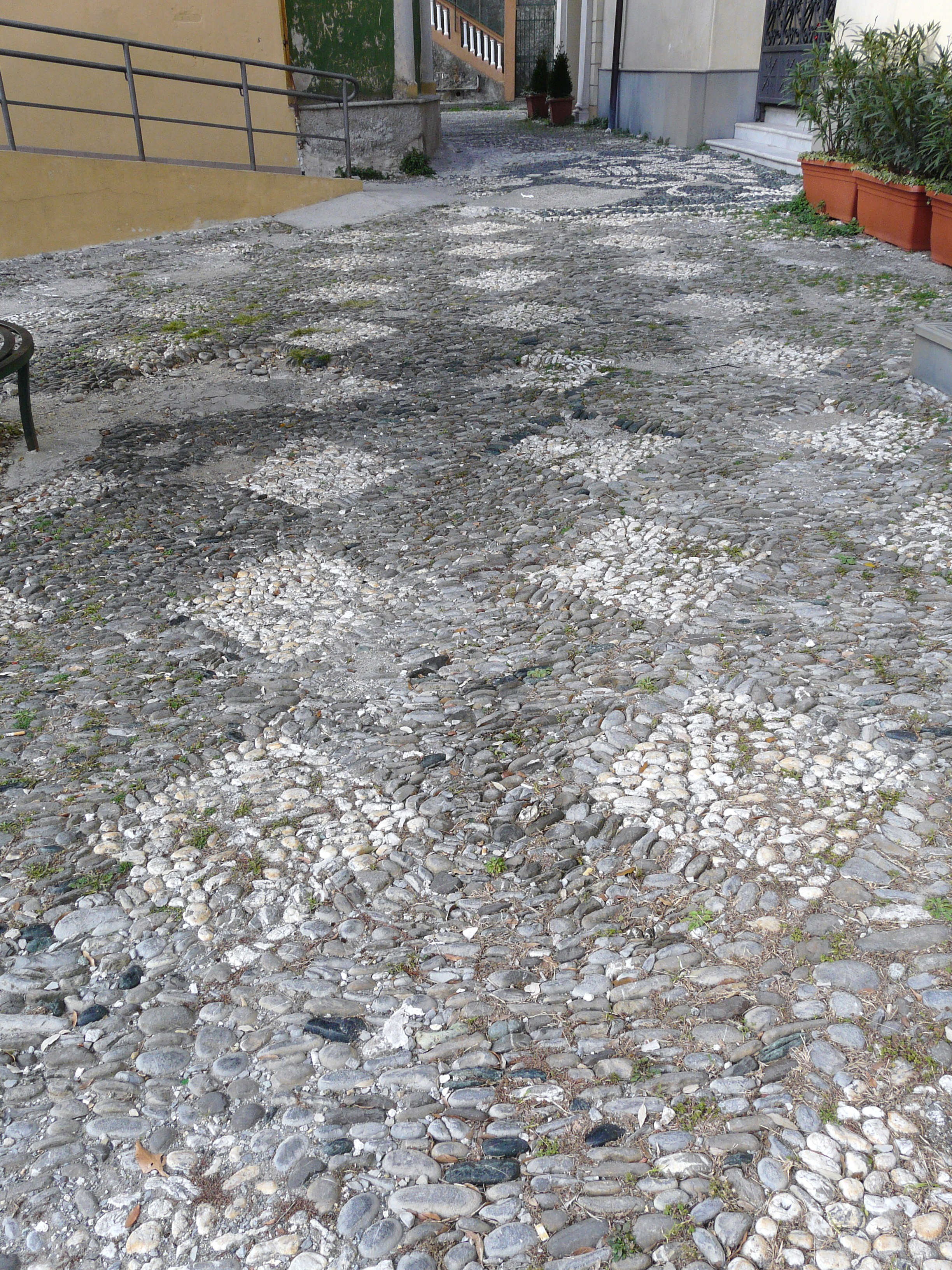 Sagrato della chiesa di Santa Maria Assunta, Apparizione, Genova, Liguria, Italia